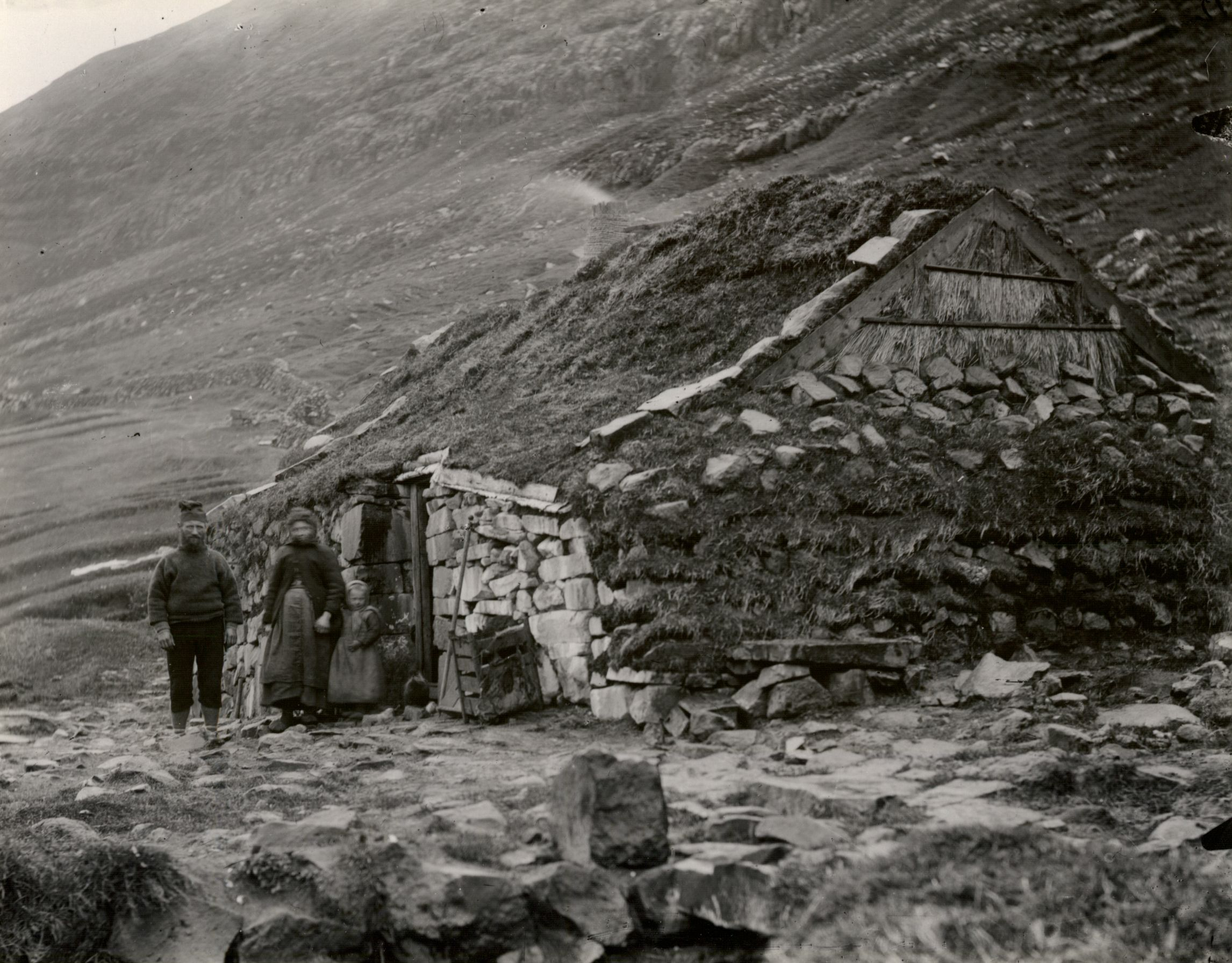 Skálatoftir, Faroe Islands